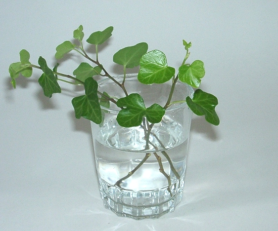 Stickling av murgröna. Foto: Användare:Chrizz.